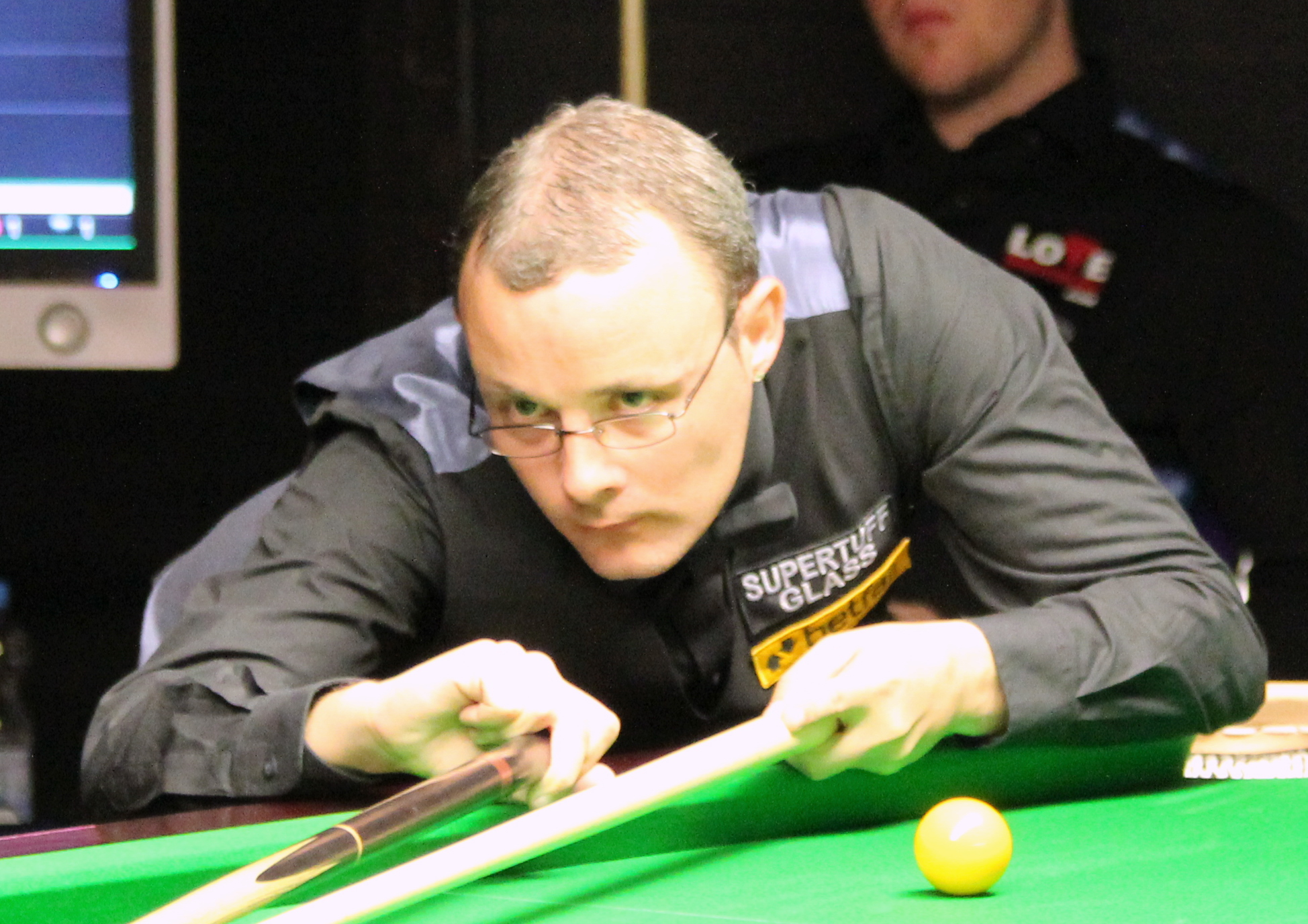 Martin Gould beim Paul Hunter Classic 2012